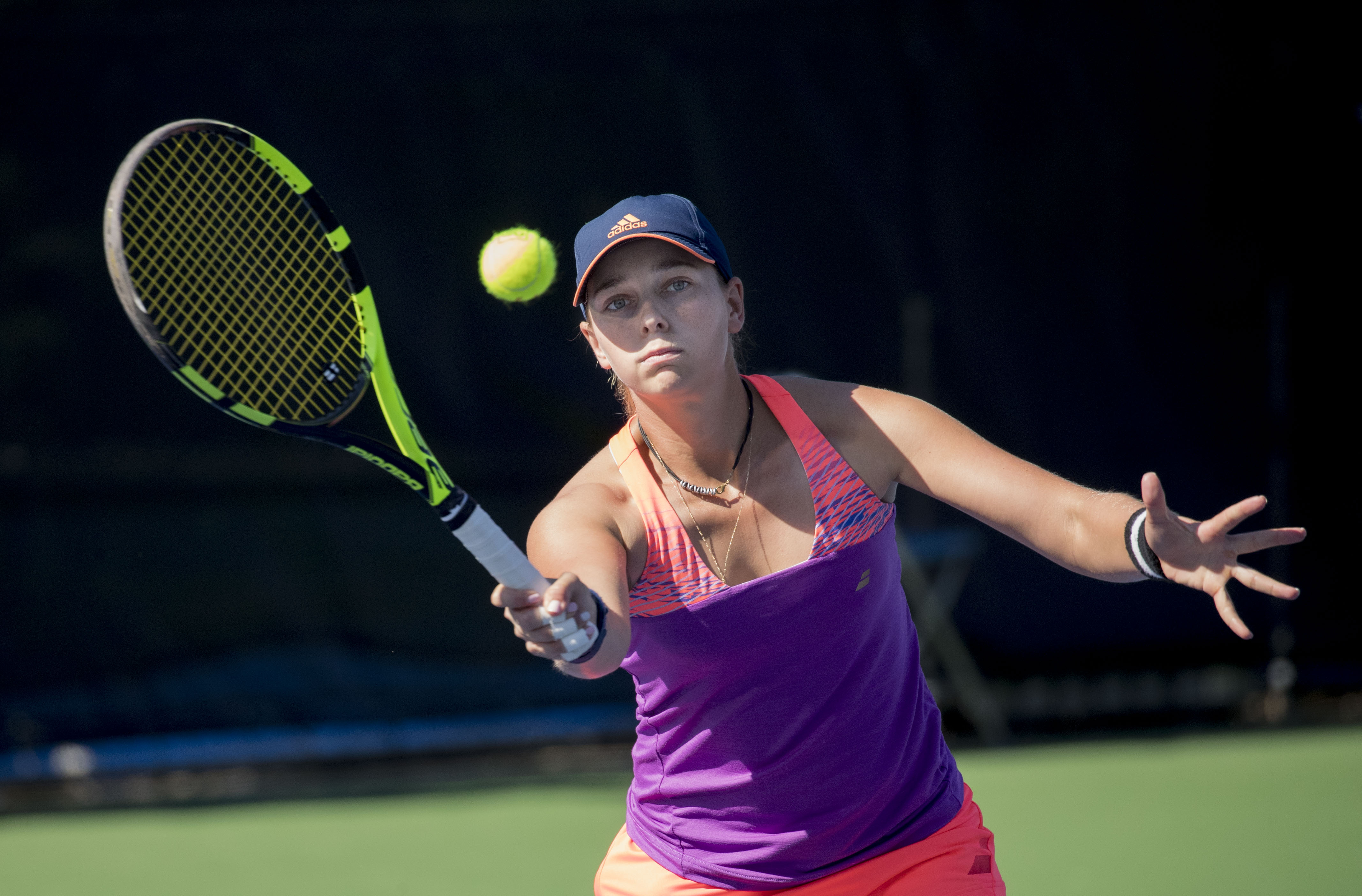 Citi Open Tennis 2017